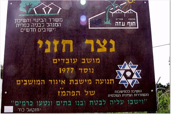 נצר חזני התמונות באדיבות קטיף.נט (קישור) אתר האינטרנט של גוש קטיף. צילם: מוטי סנדר.